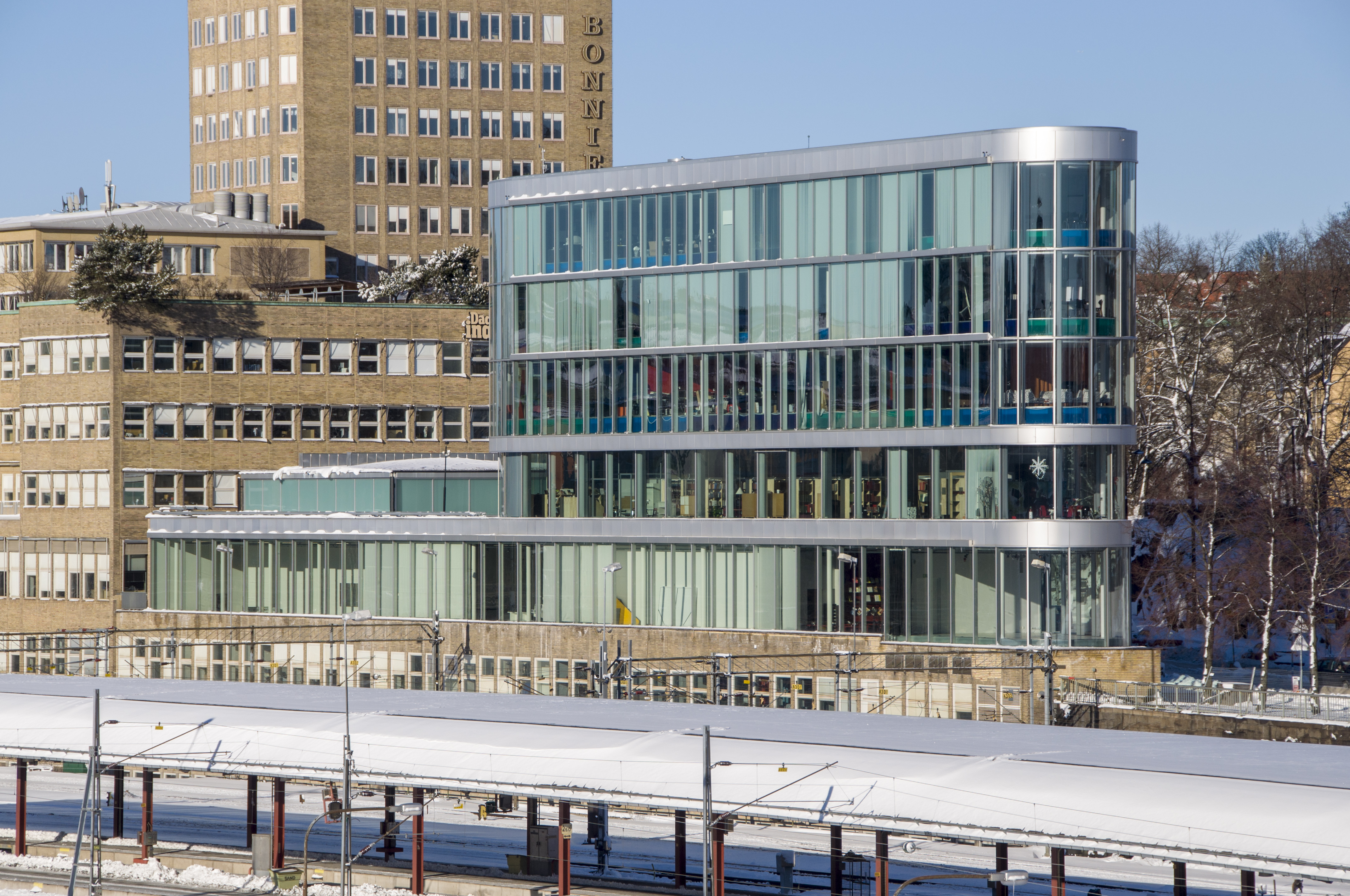 Bonniers konsthall invigd 2006. Arkitekt Johan Celsing